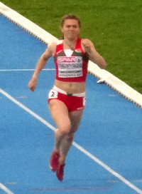 Młodzieżowe Mistrzostwa Europy w Lekkoatletyce U23 w Bydgoszczy 13-16 lipca 2017, finał biegu na 200 m kobiet